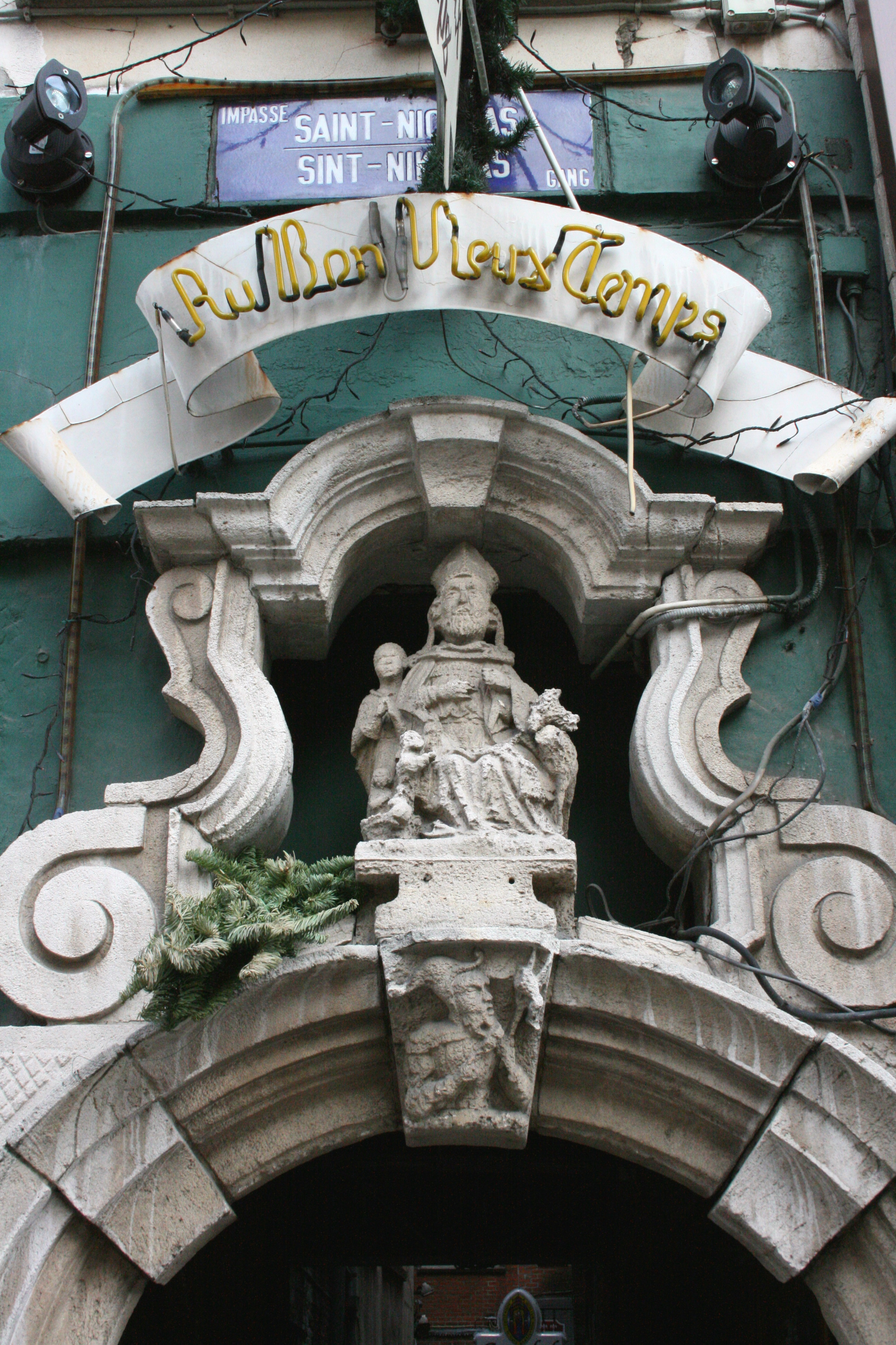 Sint-Nikolaasgang, uitmondend Grasmarkt 12-14, Brussel (België)